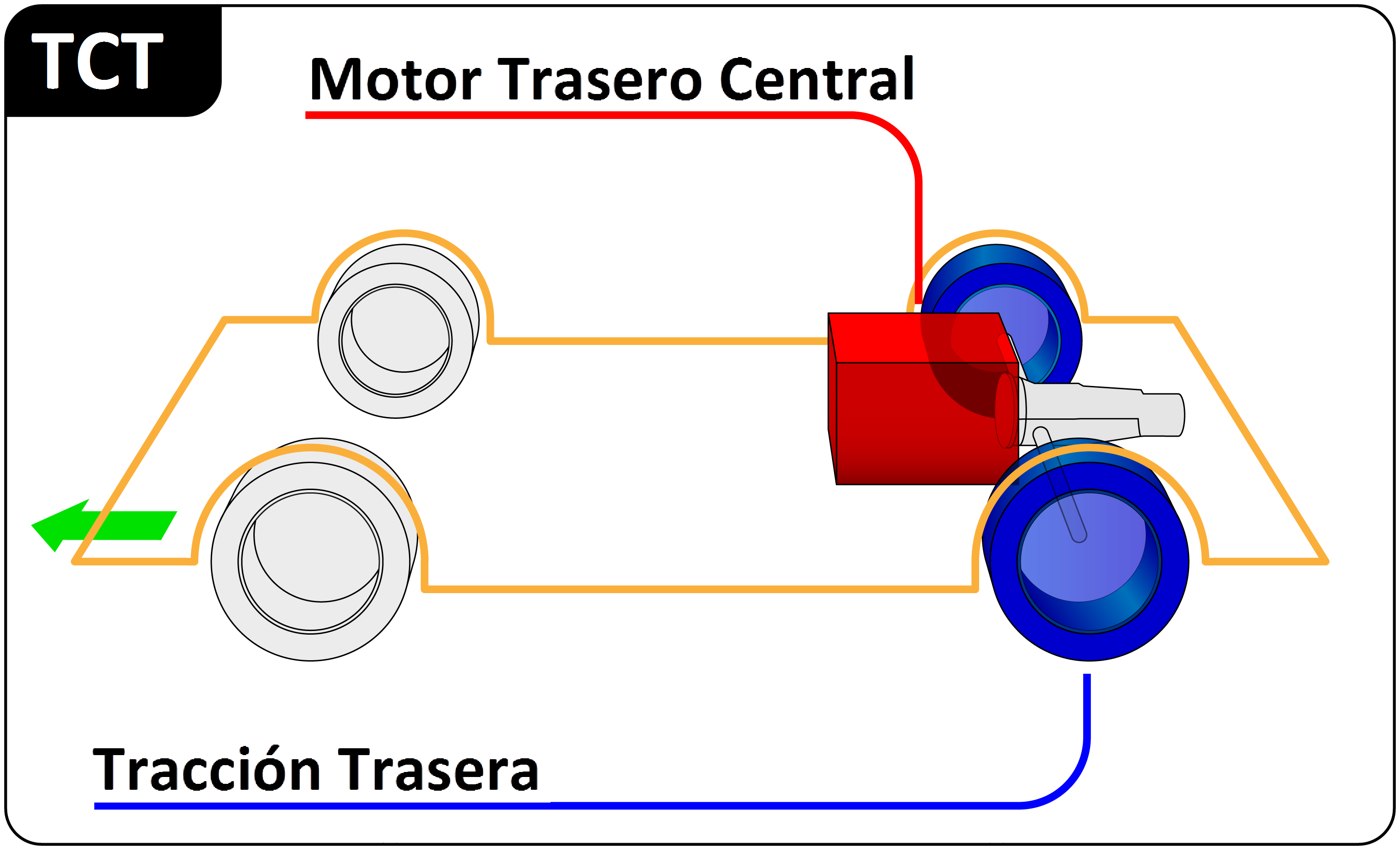 Diagrama de un vehículo con motor trasero central y tración trasera (TCT)